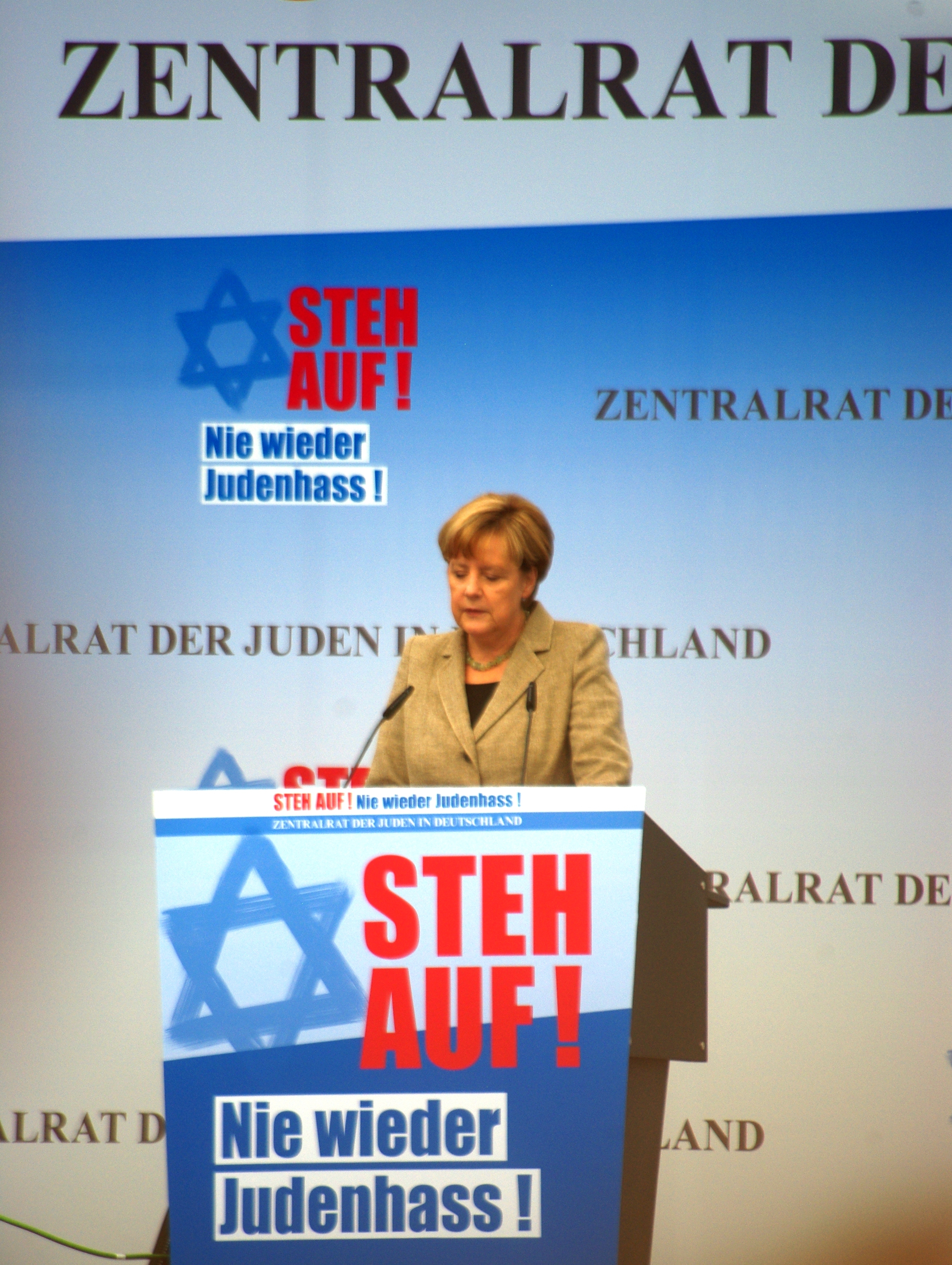 Angela Merkel durant son discours à la manifestation contre l'antisémitisme à la porte de Brandebourg le 14 septembre 2014.